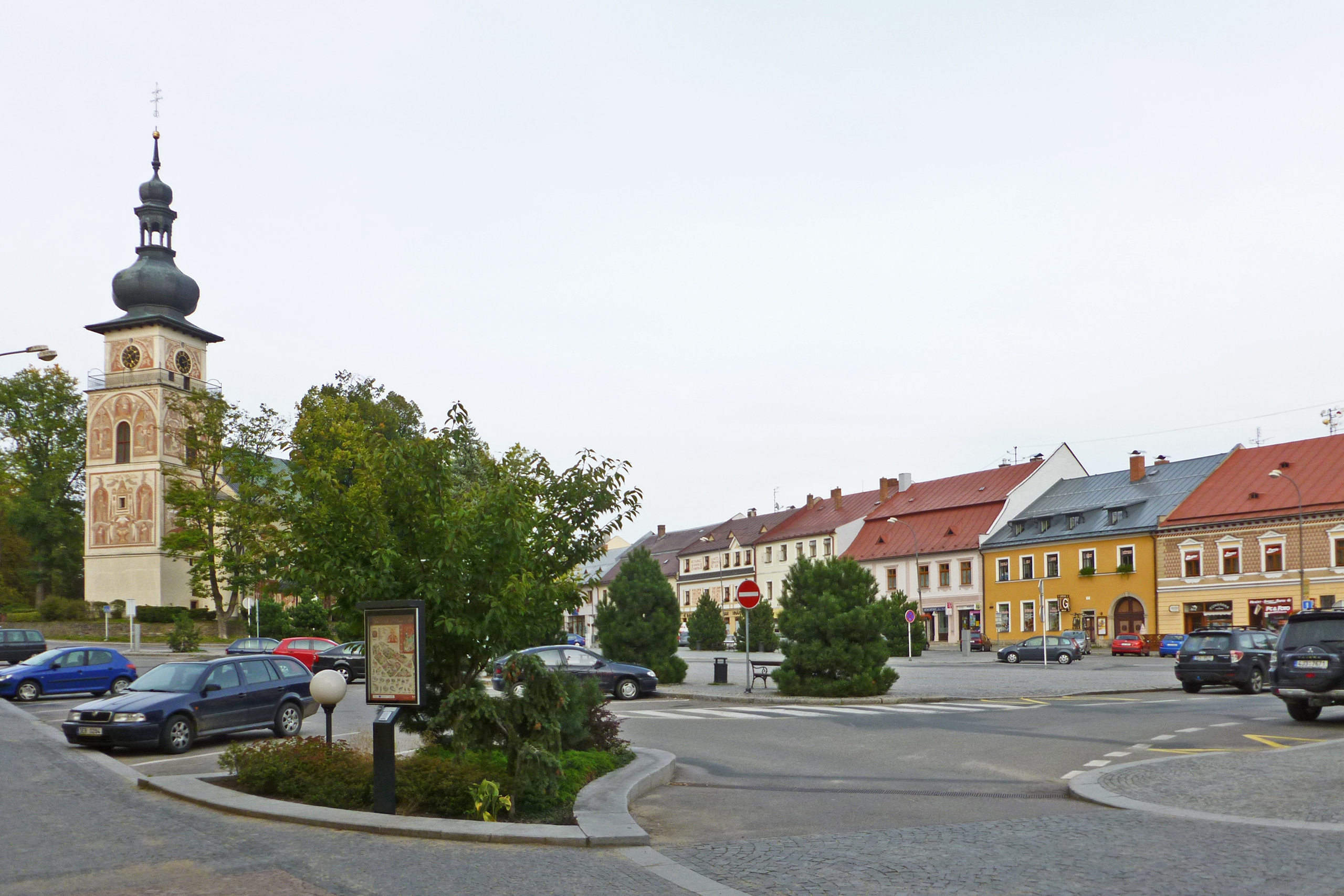 Náměstí